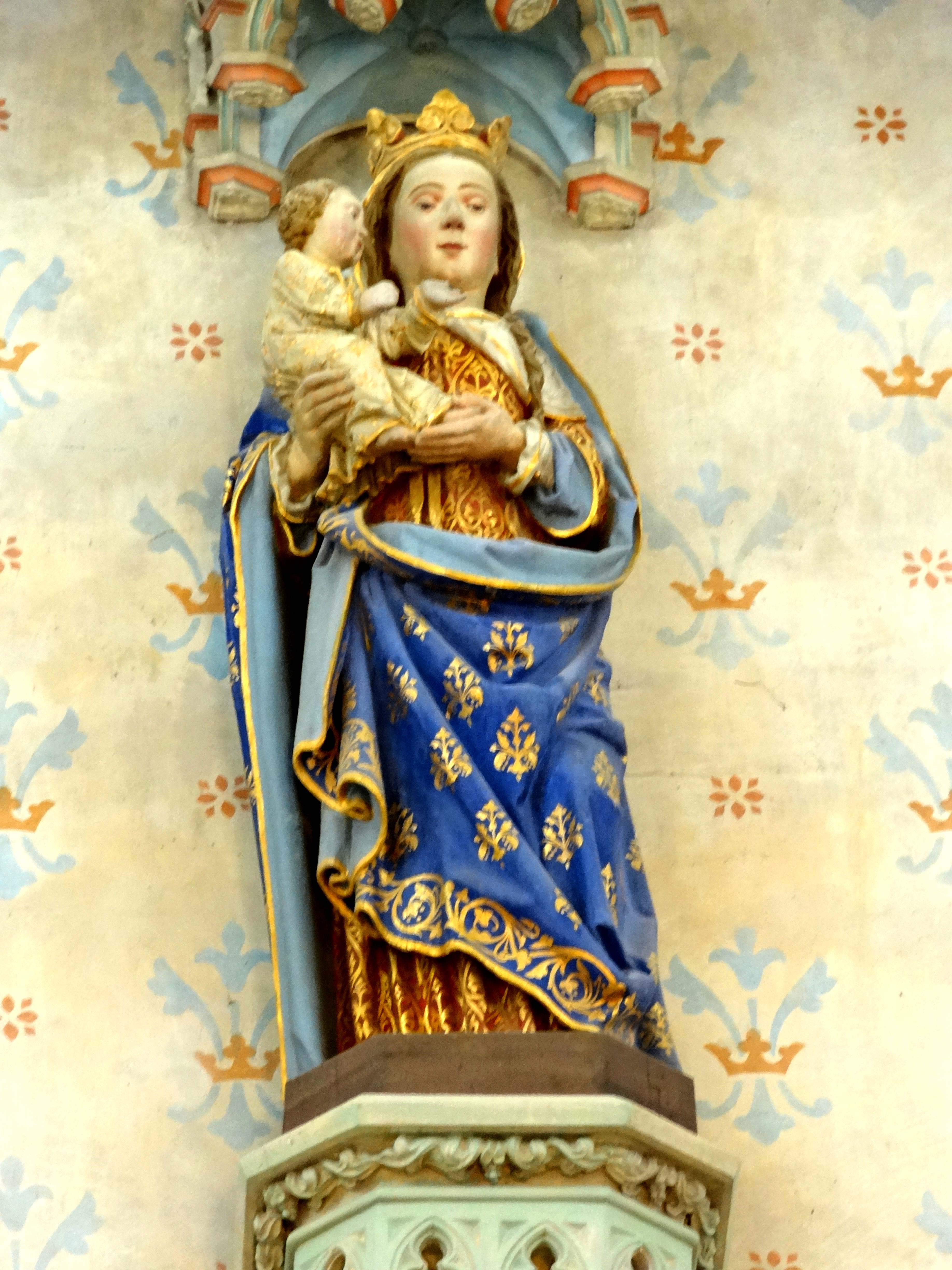 Mobilier de l'église - voir titre.